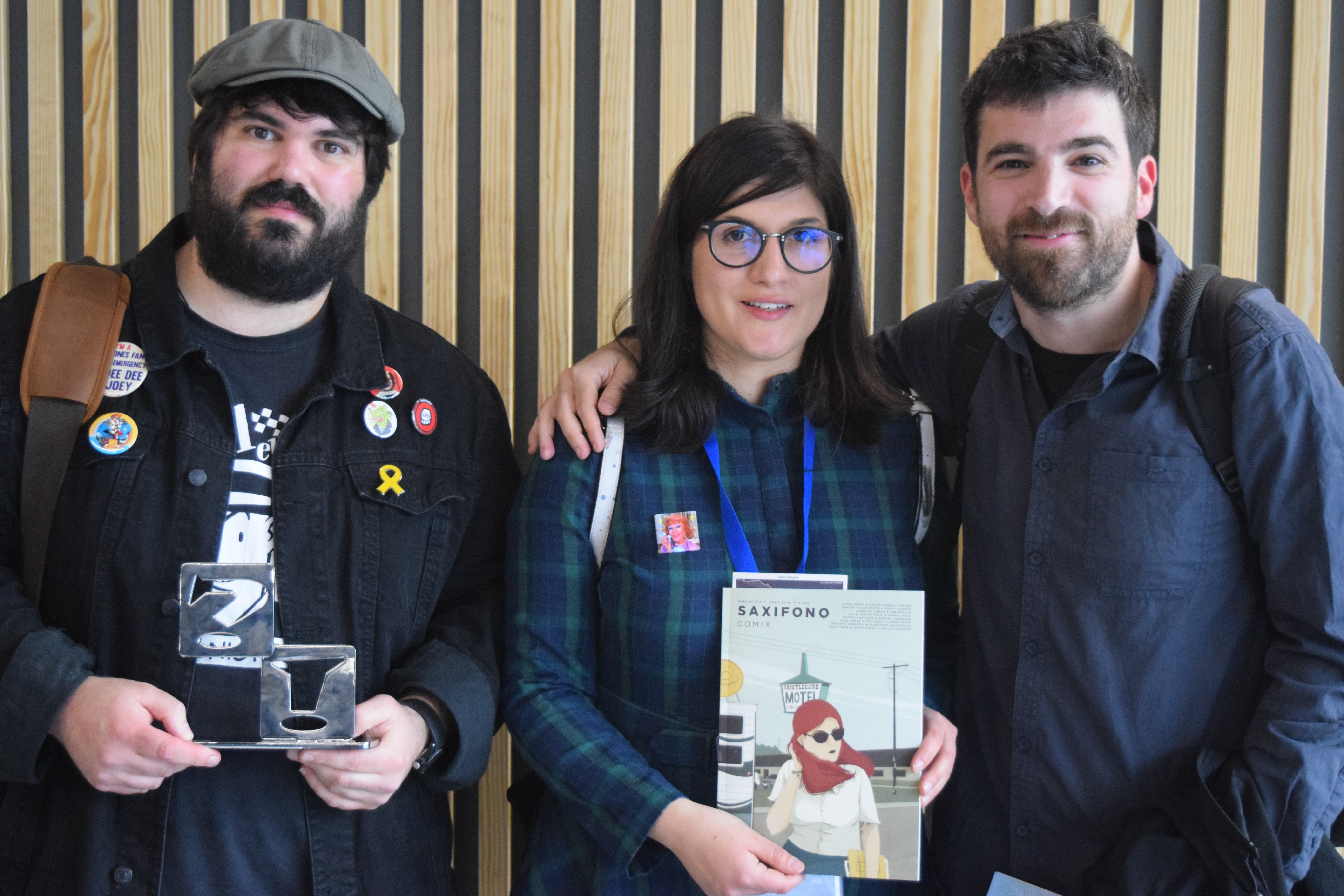 Foto de grup dels membres del fanzine valencià Saxífono. El fanzine fou guardonat amb el premi al millor fanzine. 37. Comic Barcelona.